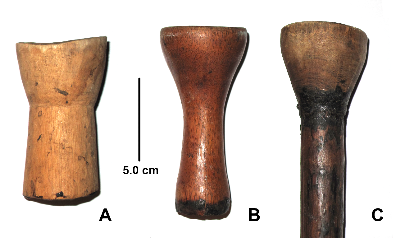 Diseños de boquillas de cerbatana de tipo II (A), y de tipo III (B y C) (Fotografía de G. A. Romero-González de tres cerbatanas de su colección personal)